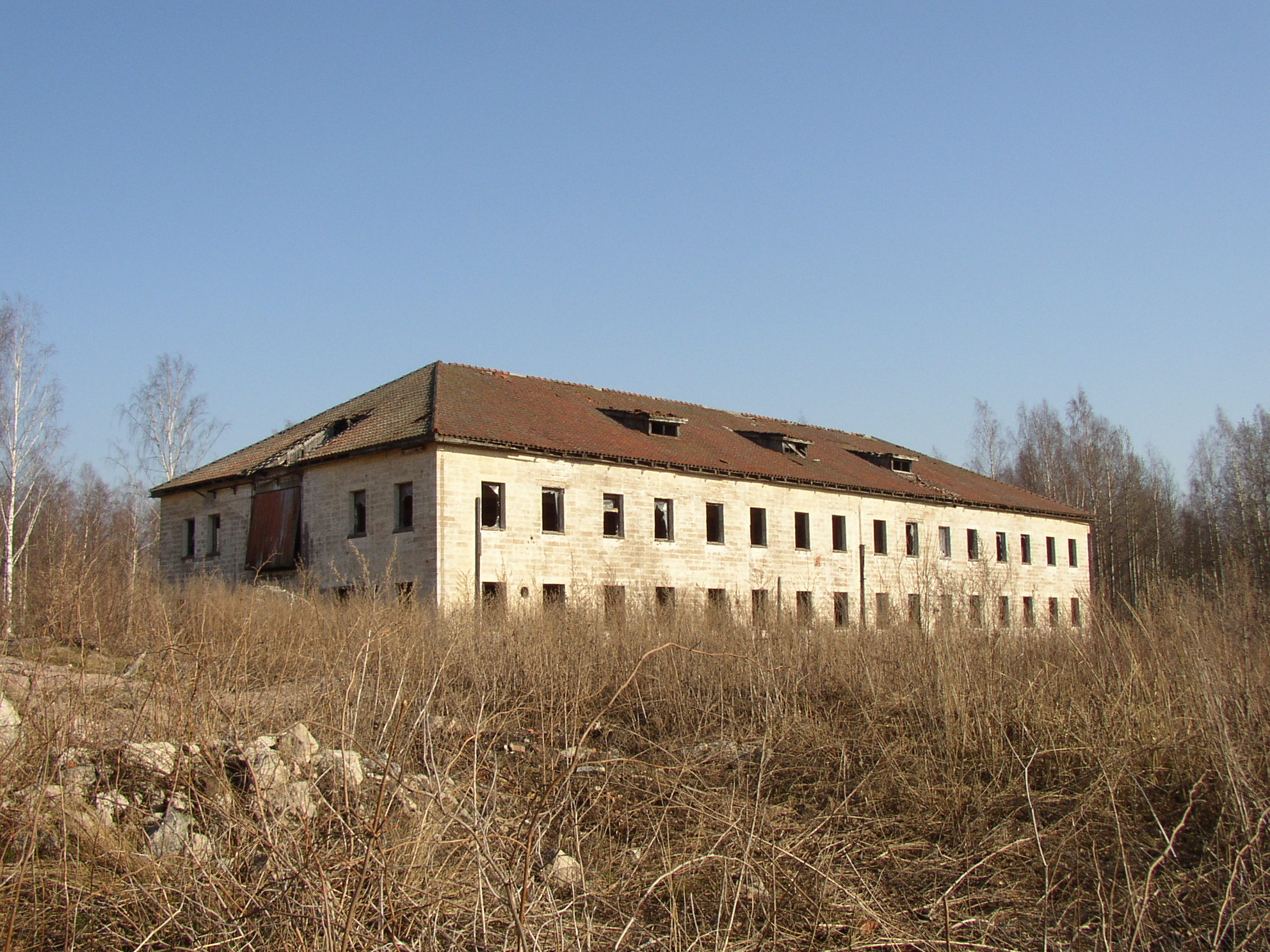 Vartsalan talotehdas hylättynä vuonna 2004. Rakennus on sittemmin kunnostettu.